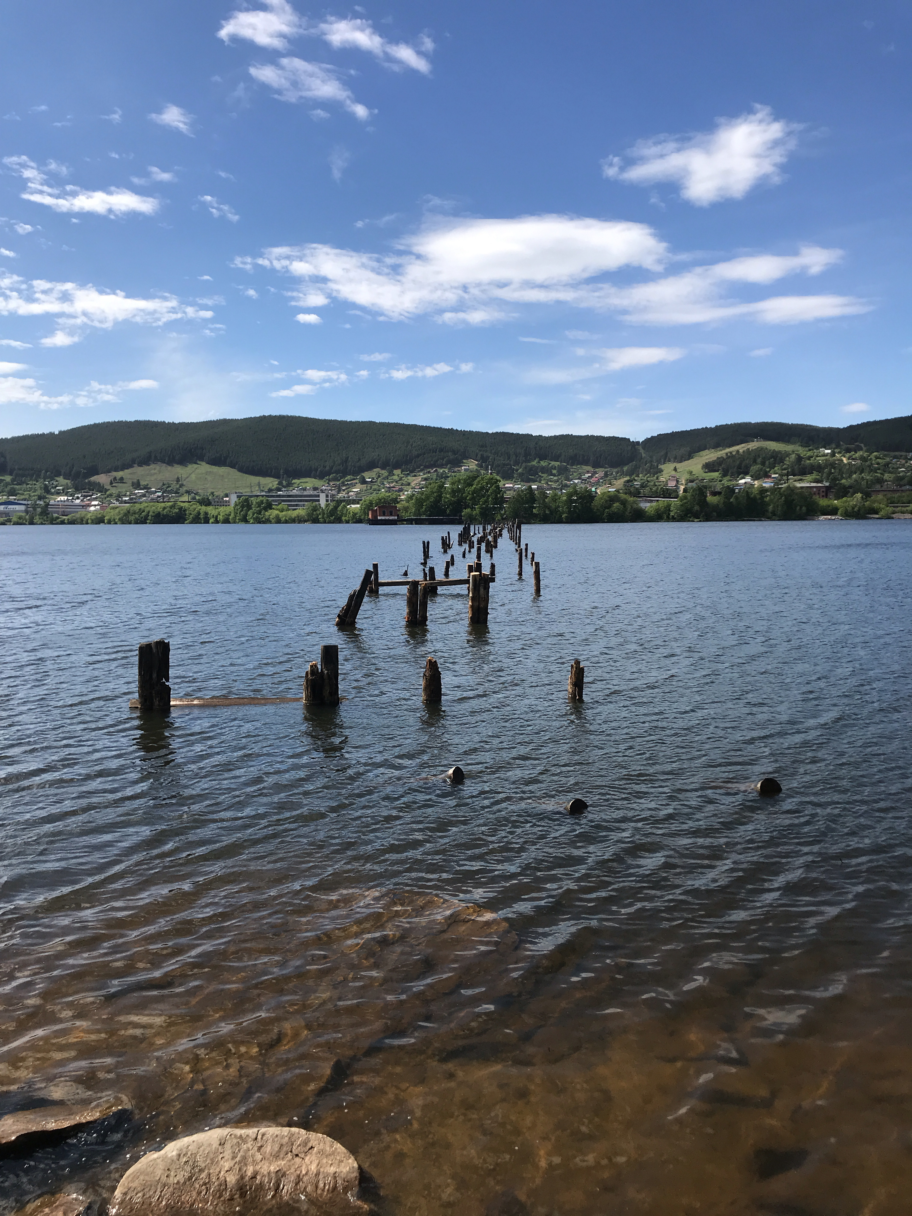 Белорецкий деревянный мост был построен в 1936 году, его длина составляла свыше 550 метров. Мост находился на балансе Белорецкого металлургического комбината, в начале 2000-х комбинат сменил собственника, став дочерней компанией более крупной металлургической компании. К концу 2010-х мост фактически являлся бесхозным и находился в аварийном состоянии. В начал 2020 года мост был разобран, опоры моста оставлены.